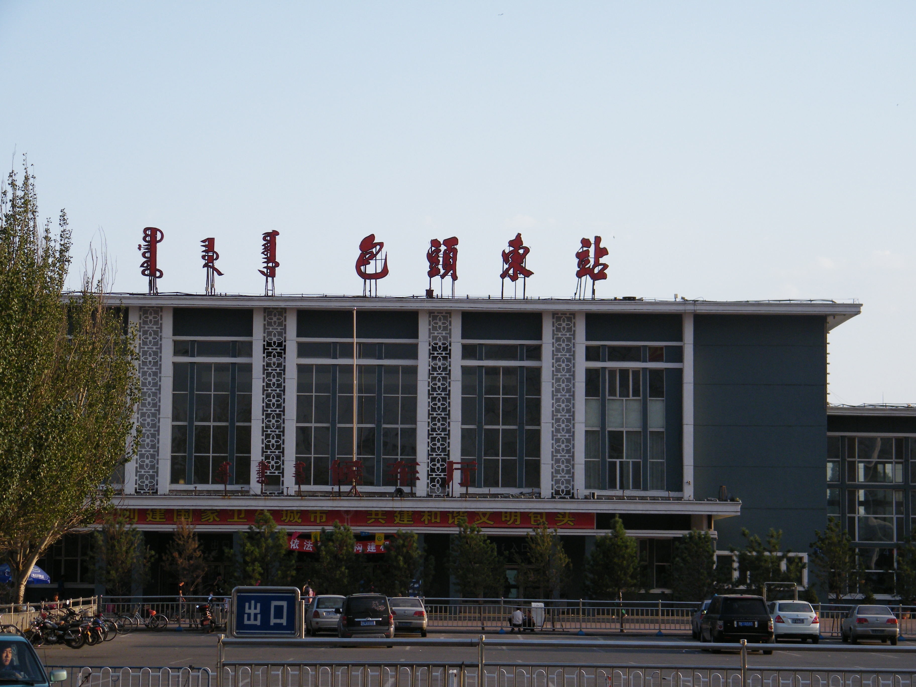 包头东站